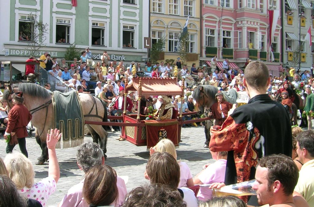 Landshuter Hochzeit, 2005